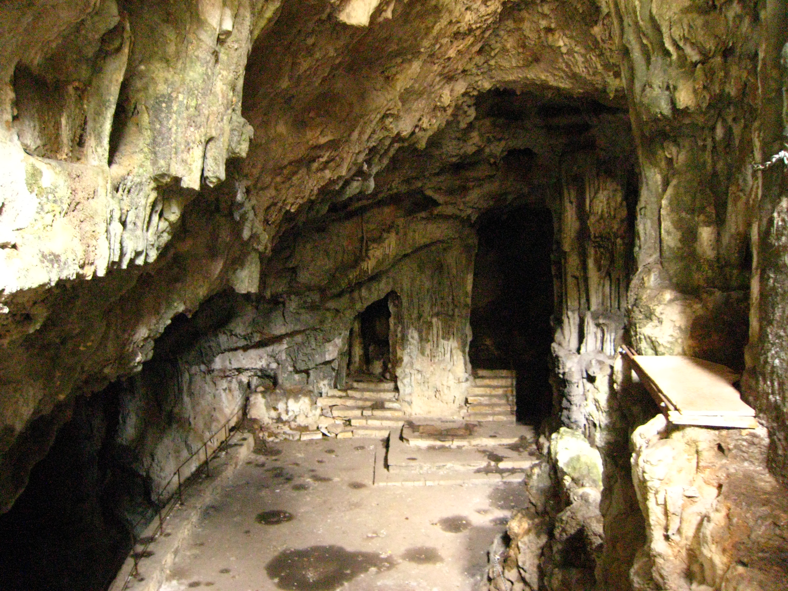 La Grotta di San Servolo, vicino al Castello di San Servolo. Gennaio 2008